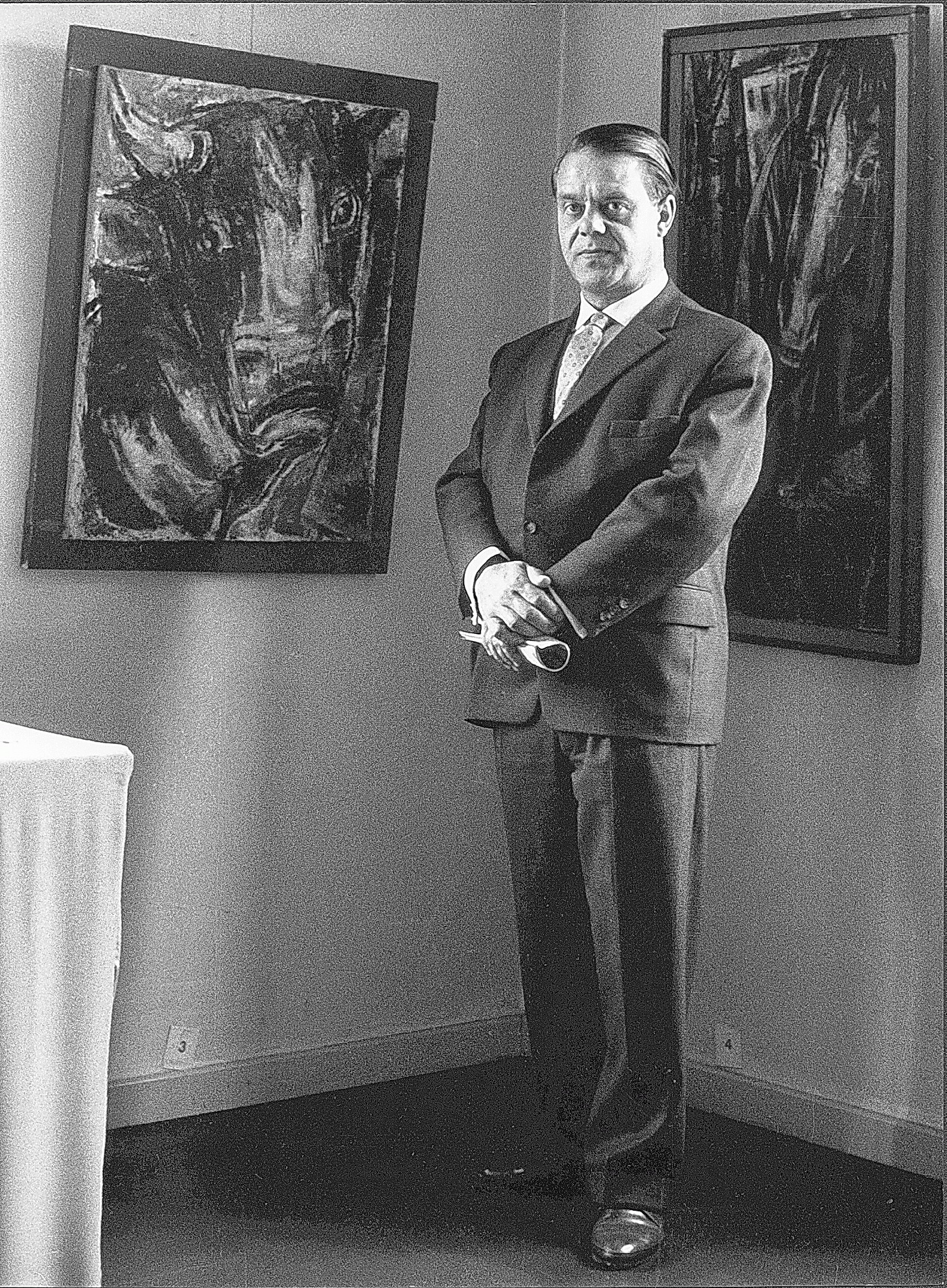 Fotographie des Malers Ernst Wolfhagen in seinem Atelier in Hannover